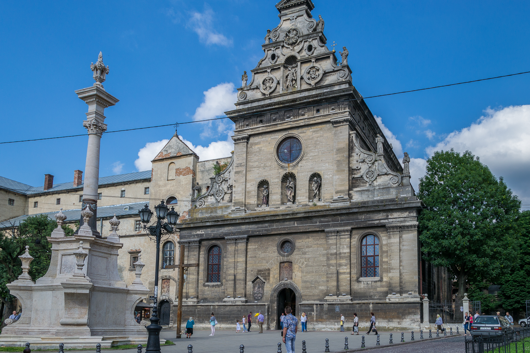 церква св.Андрія, Львів, Соборна пл., 3а